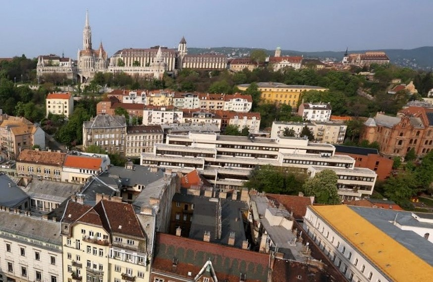 A nagy, lapos tetős, fehér épületben van az Alkotmánybíróság.